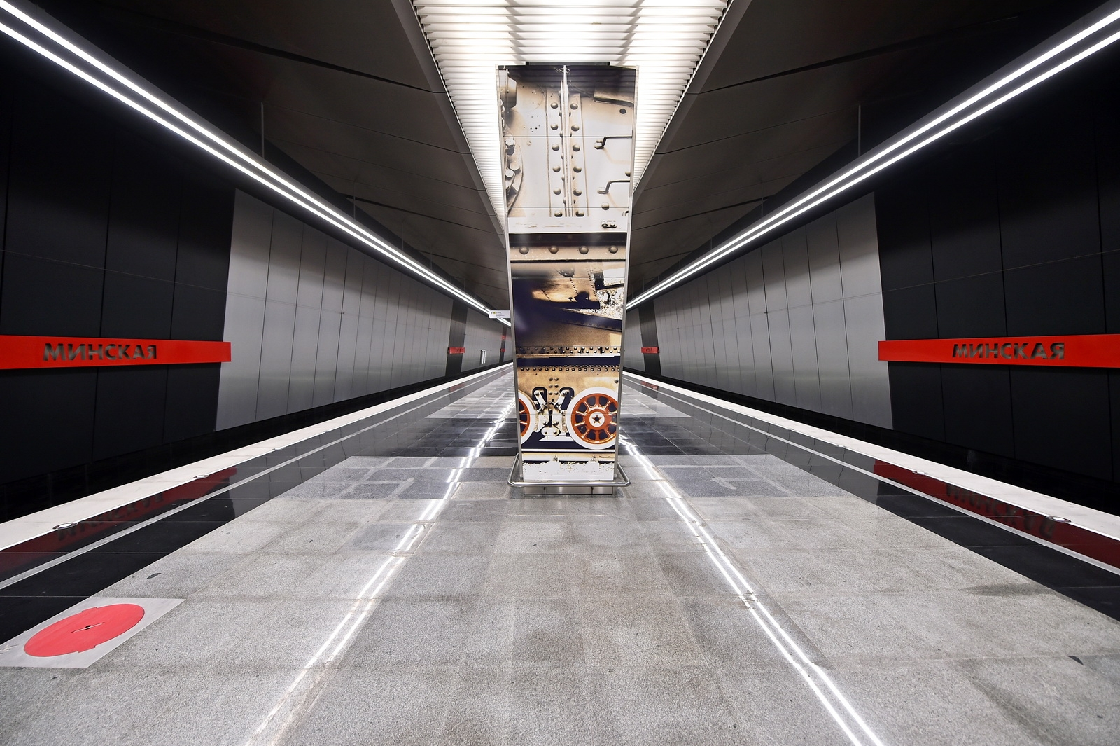 Станция Минская Московского метрополитена. Платформа